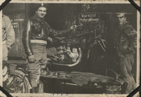 warsztat motocyklowy na dworcu w Gubbio, 1945 r.